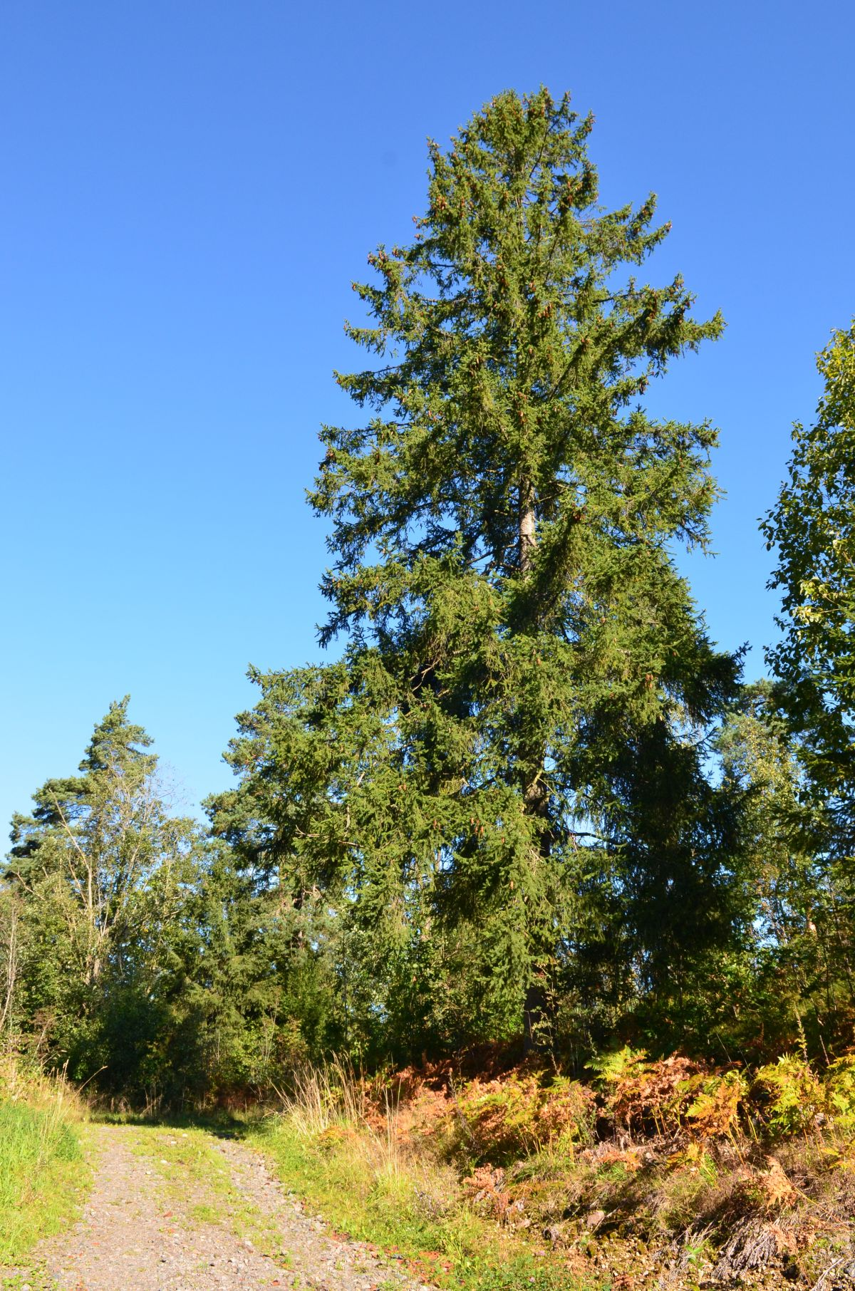 Himberggrana.